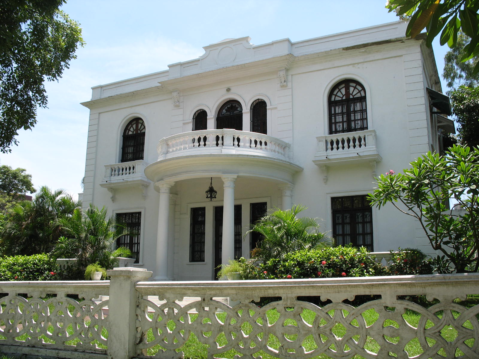 Muestra de arquitectura republicana en Barranquilla